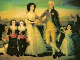 Carlos José Gutiérrez de los Ríos y su familia por Francisco de Goya. Aparece el VI conde de Fernán Núñez; su mujer, María de la Esclavitud y sus hijos.